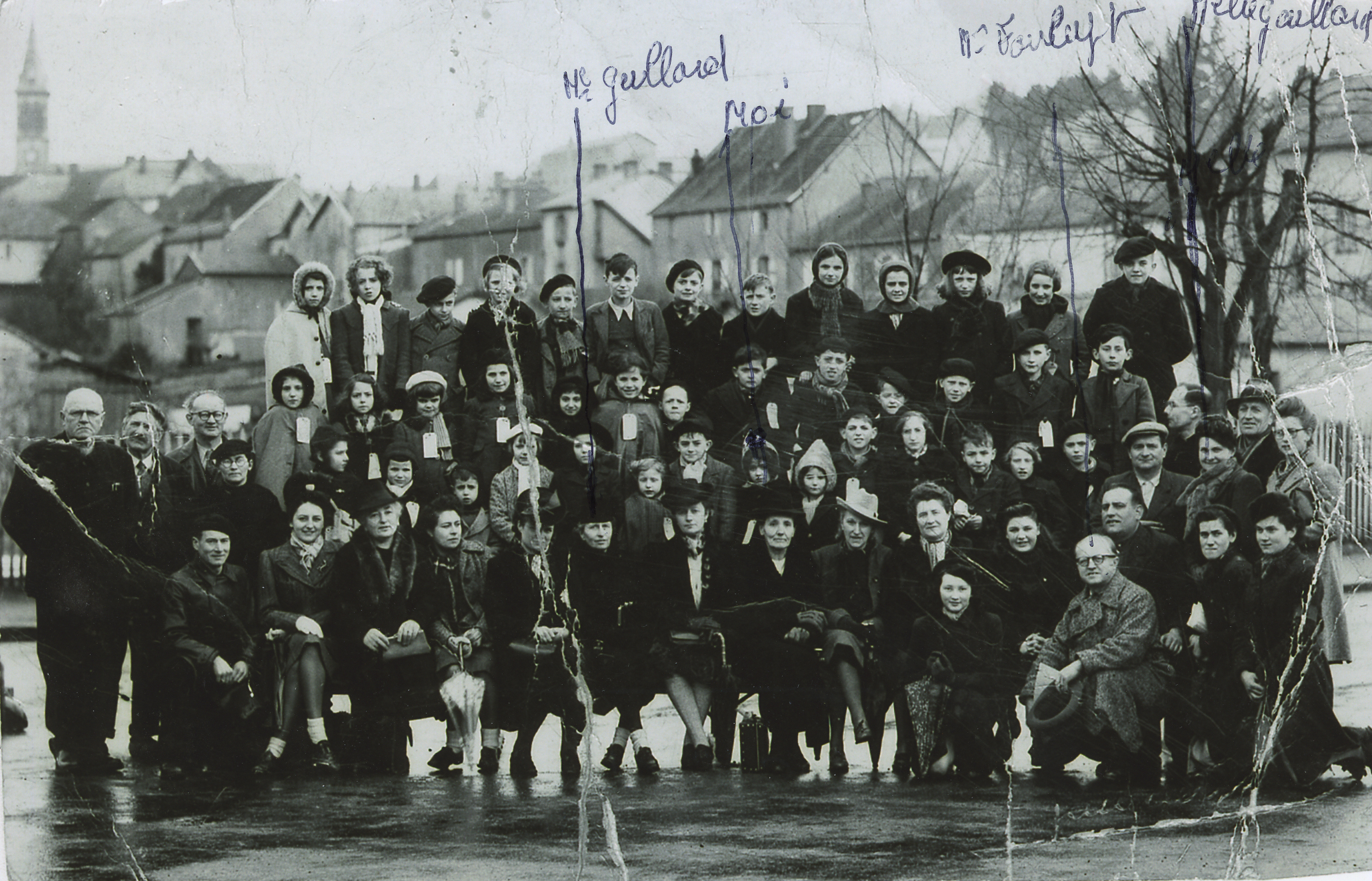 Février 1942 à La Clayette. De gauche à droite : Marie-Aimée Gaillard, Rébecca Hakim, M. Fonlupt, Clotilde Gaillard